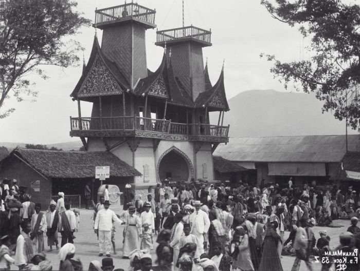 foto. Pakam Malam, Jaarmarkt, Fort de Kock, 1907